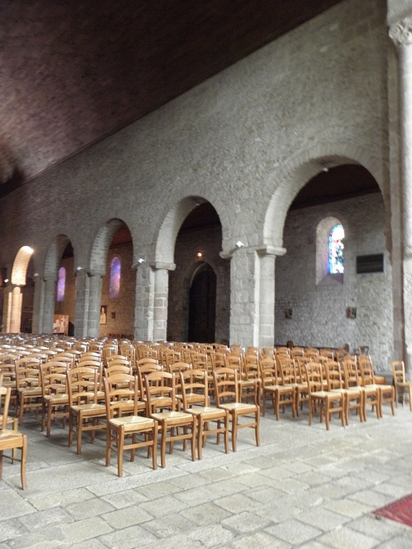 Costale nord de la nef de l'abbatiale Saint-Sauveur de Redon (35). .